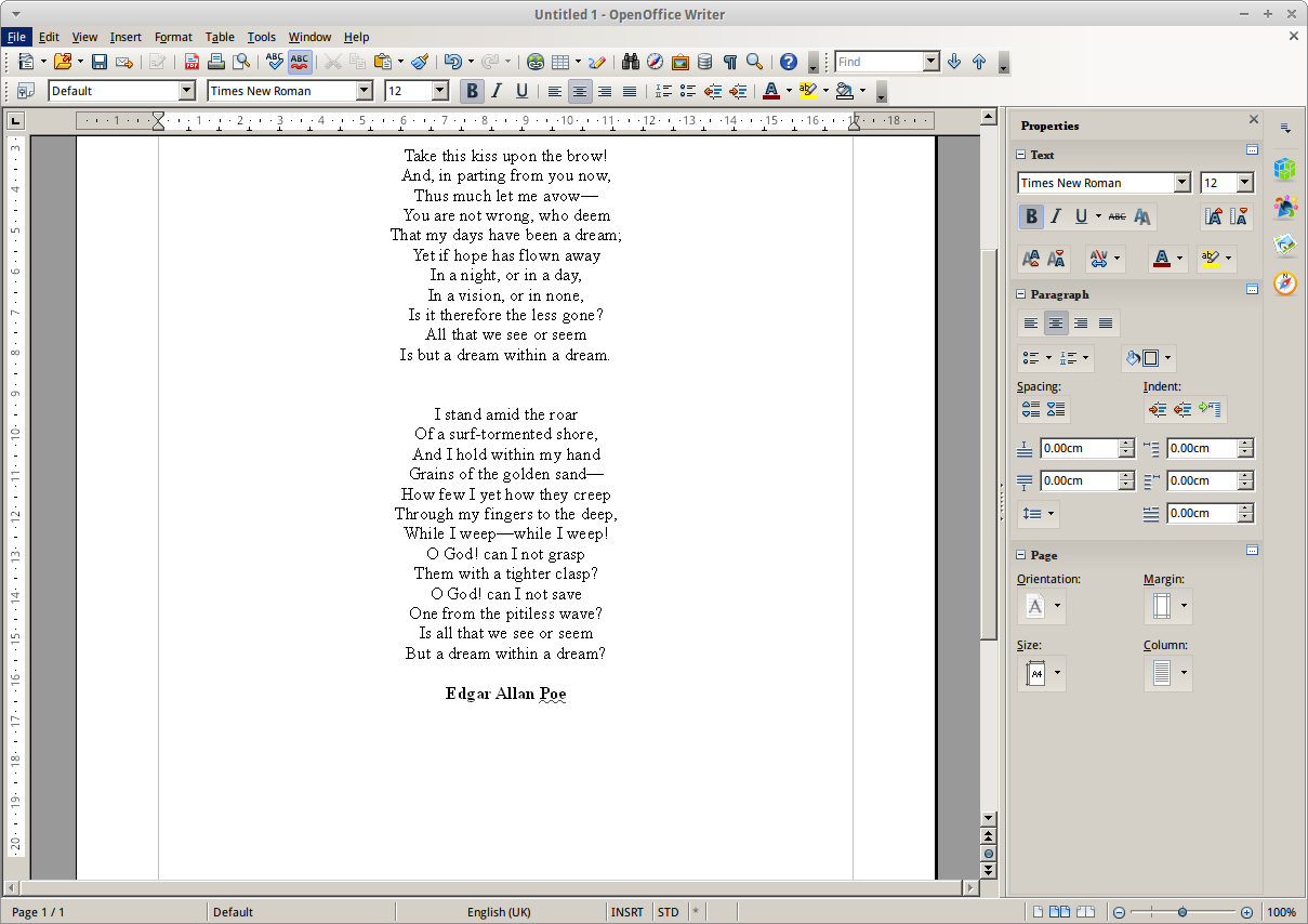 Apache OpenOffice 4.0 Writer (Windows version under Wine).